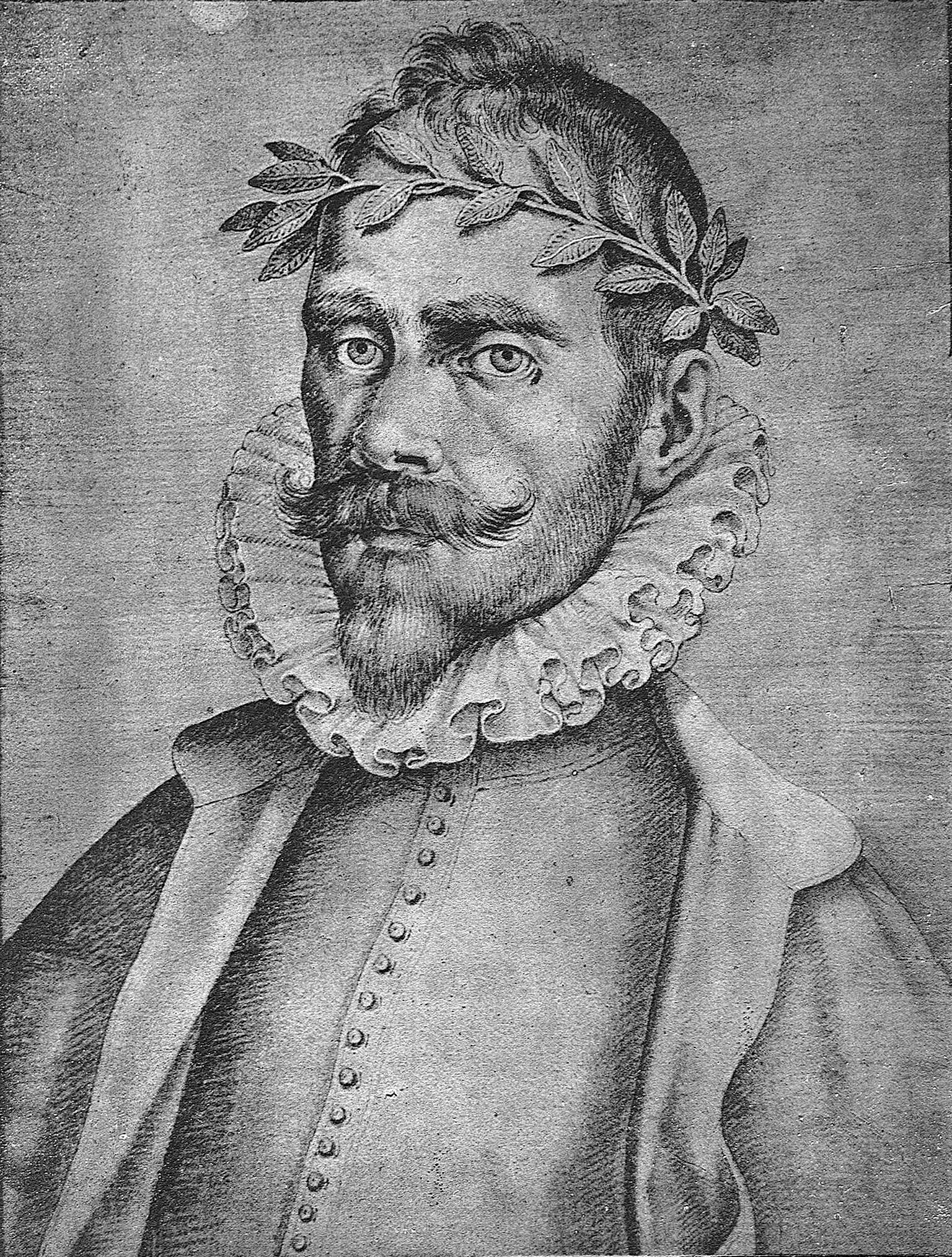 Gutierre de Cetina en Francisco Pacheco, (1564-1644) El libro de descripción de verdaderos retratos, ilustres y memorables varones, [Sevilla, s.n., s.a.]- Real Academia de la Historia (Madrid). Signatura: 1/736